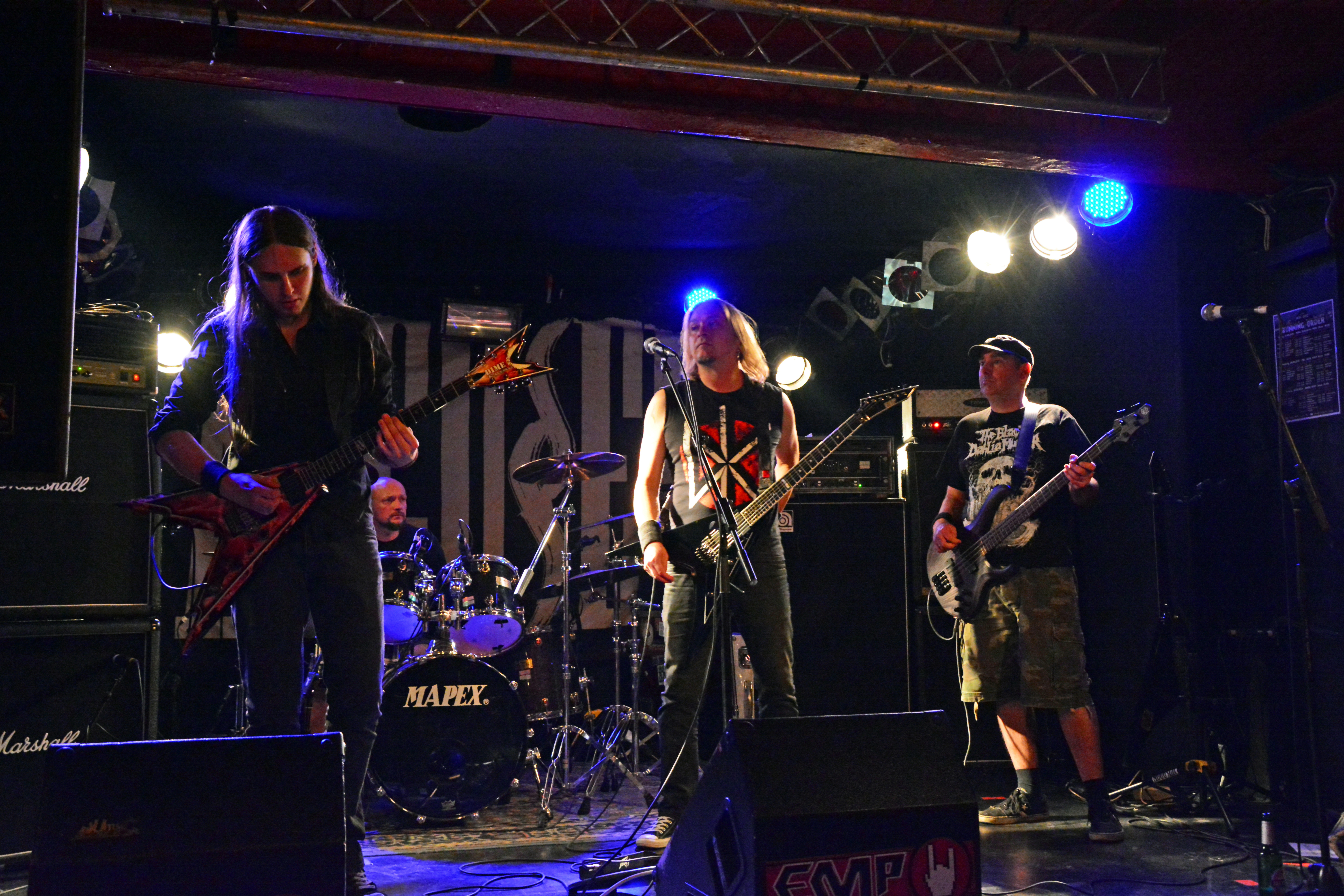 Accu§er beim Soundcheck bei den Hamburg Metal Dayz 2013